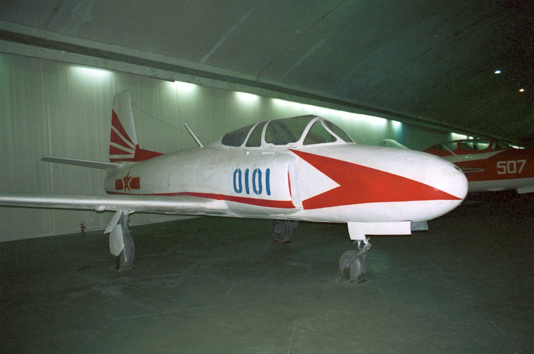 Shenyang JJ-1 im Luftfahrtmuseum Datang Shan nördlich von Beijing.